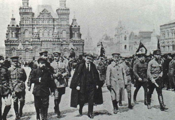 Srpskohrvatski / српскохрватски: Lenjin i drugovi vrše smotru Crvene garde na Crvenom trgu u Moskvi 1919. Na fotografiji je moguće videti i crnogorskog revolucionara, dr Vukašina Markovića, učesnika tri revolucije i pokretača jedne neuspele revolucionarne pobune. Marković je treći s leva - brada i napoleonska poza.